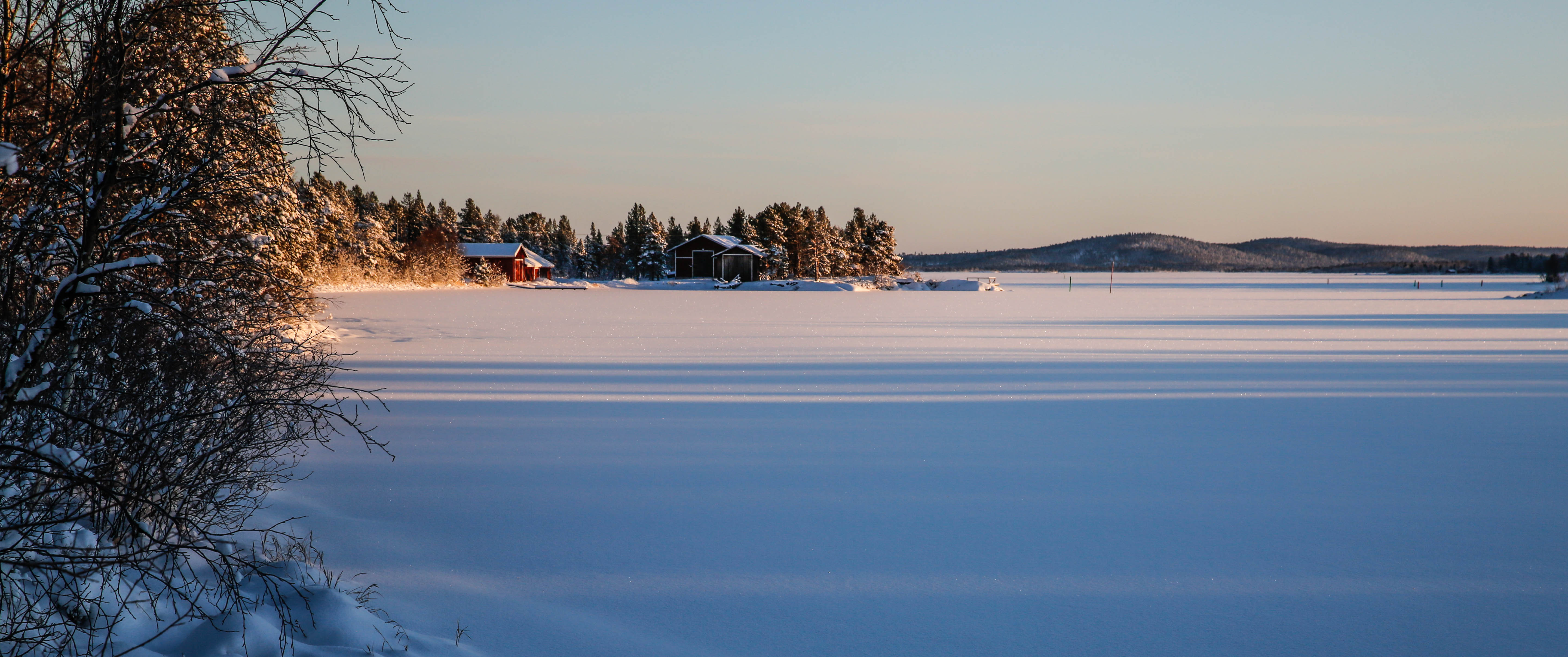 Lake Inari, Lapland, Finland